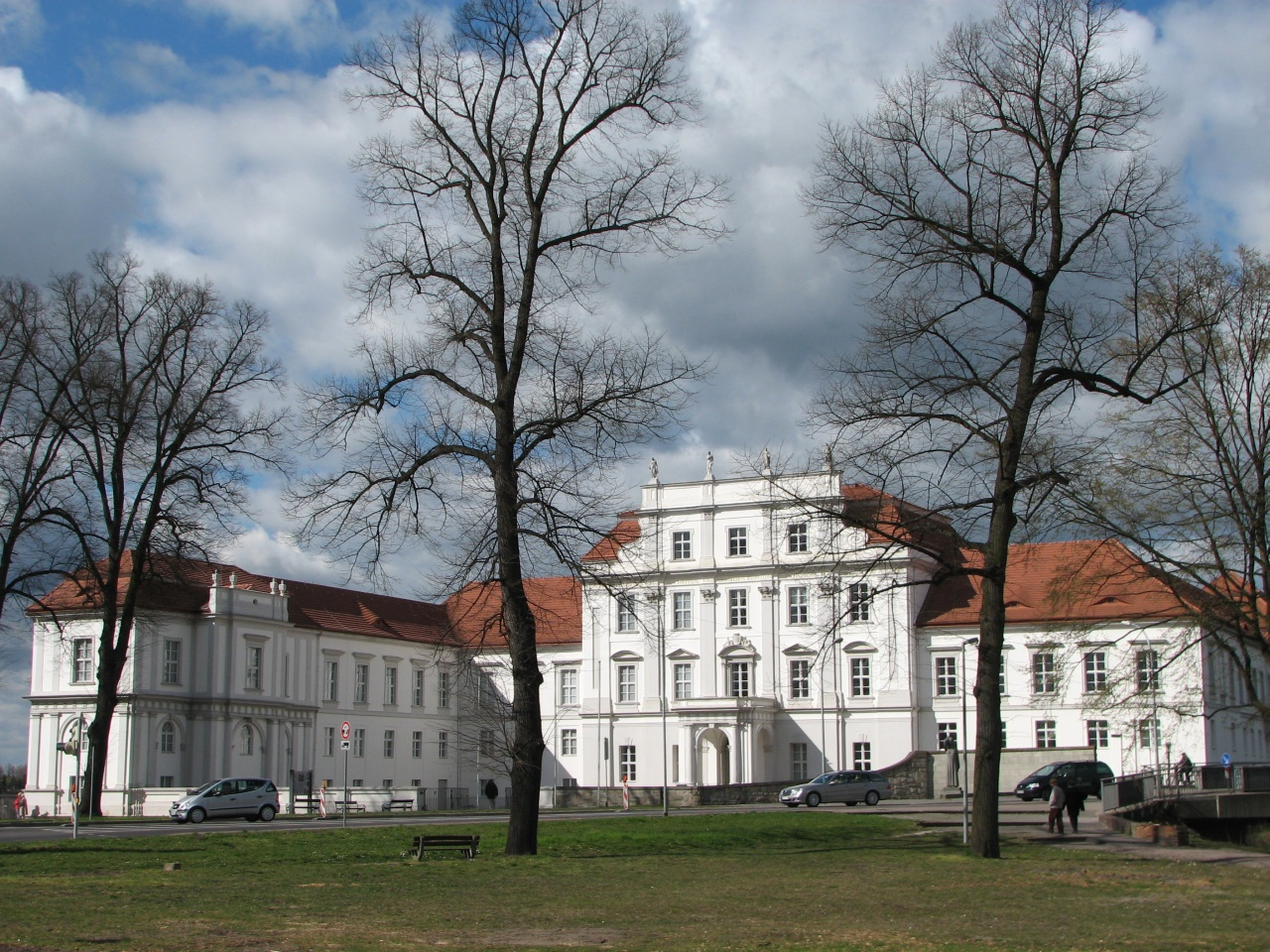 Schloss Oranienburg